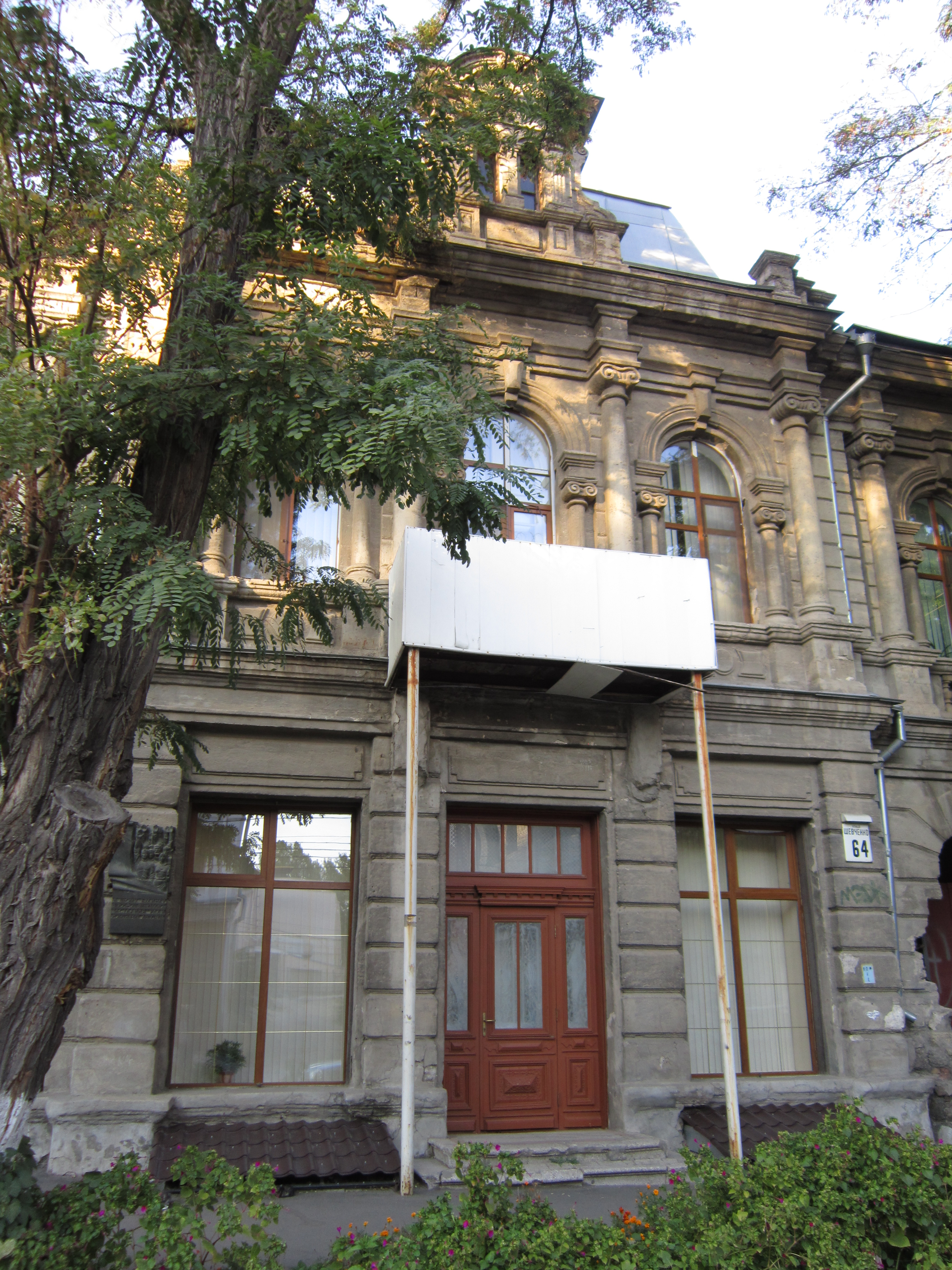 Житловий будинок прибуткового типу в якому в 1905 р. проходили засідання першої Ради робітничих депутатів, Миколаїв, вул. Шевченка, 64